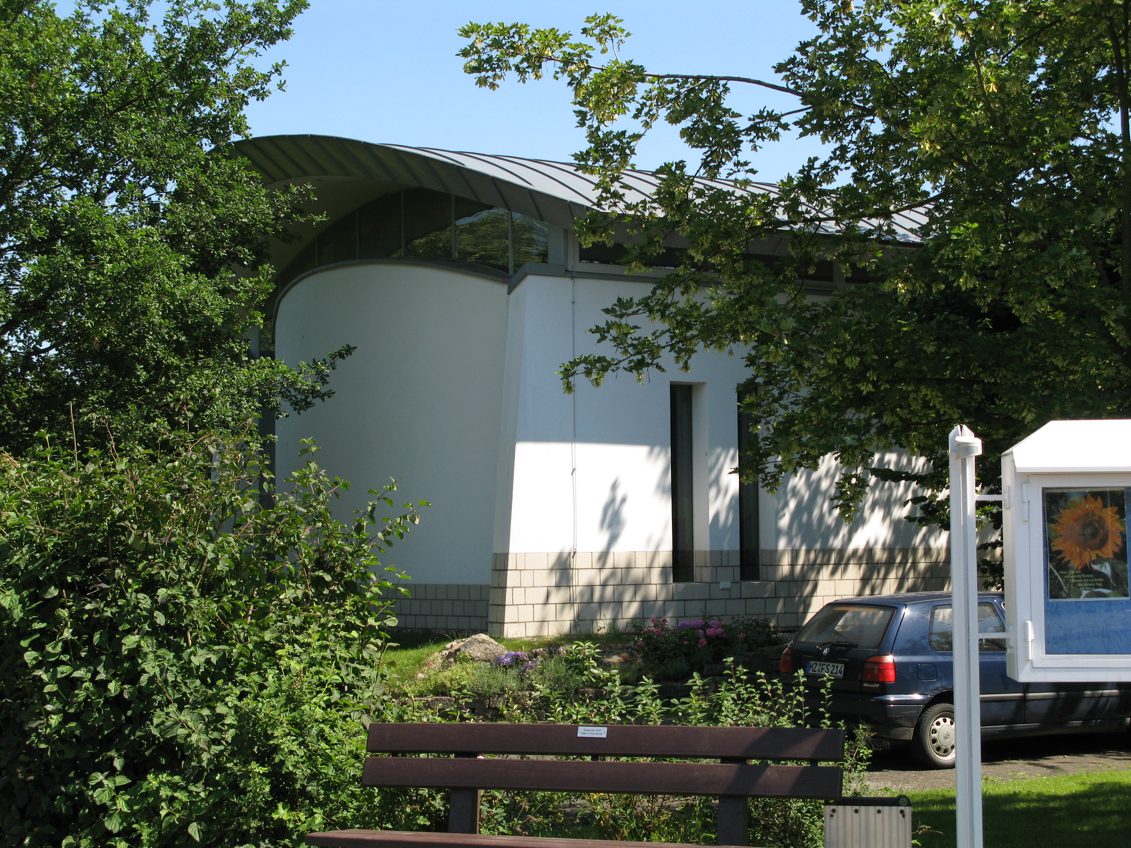 Evangelisches Gemeindezentrum in Ebersheim.